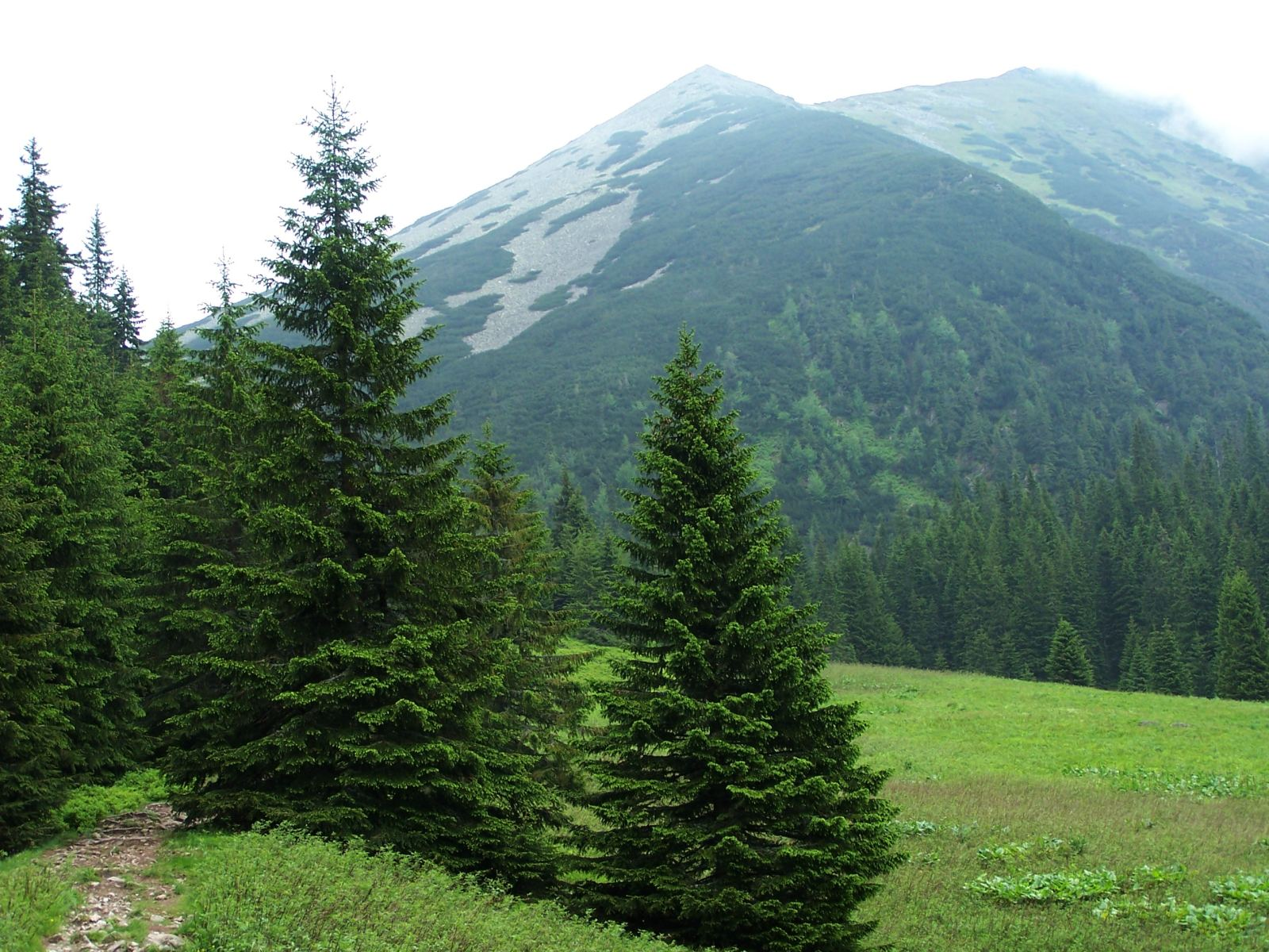 Suchy Wierch and Tomanowy Wierch Polski (West Tatra Mountains)